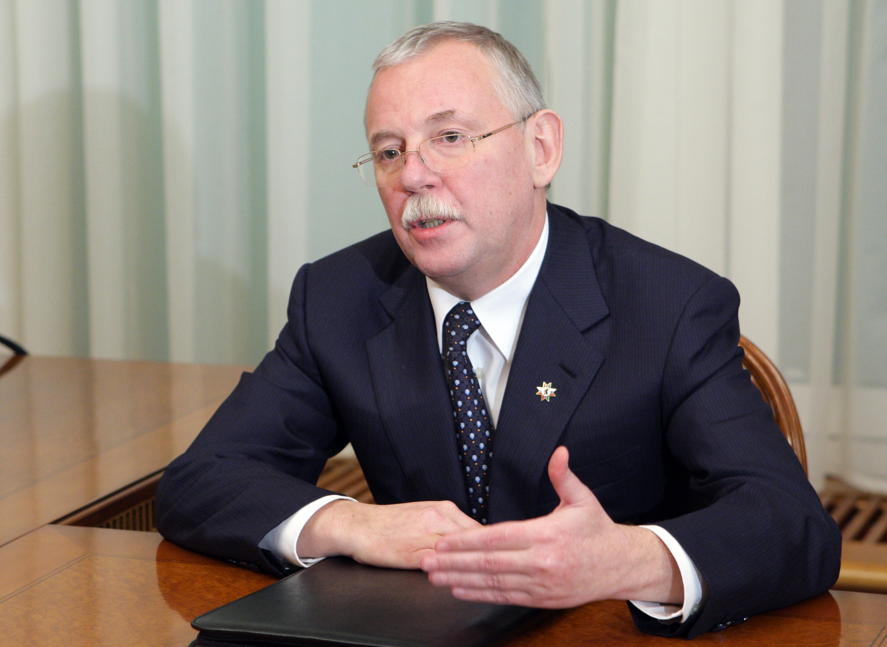 Глава Республики Карелия А. В. Нелидов на встрече с Председателем Правительства Российской Федерации В. В. Путиным